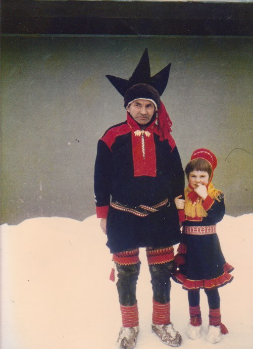 Aslak Somby sammen med barnebarnet Silja Somby